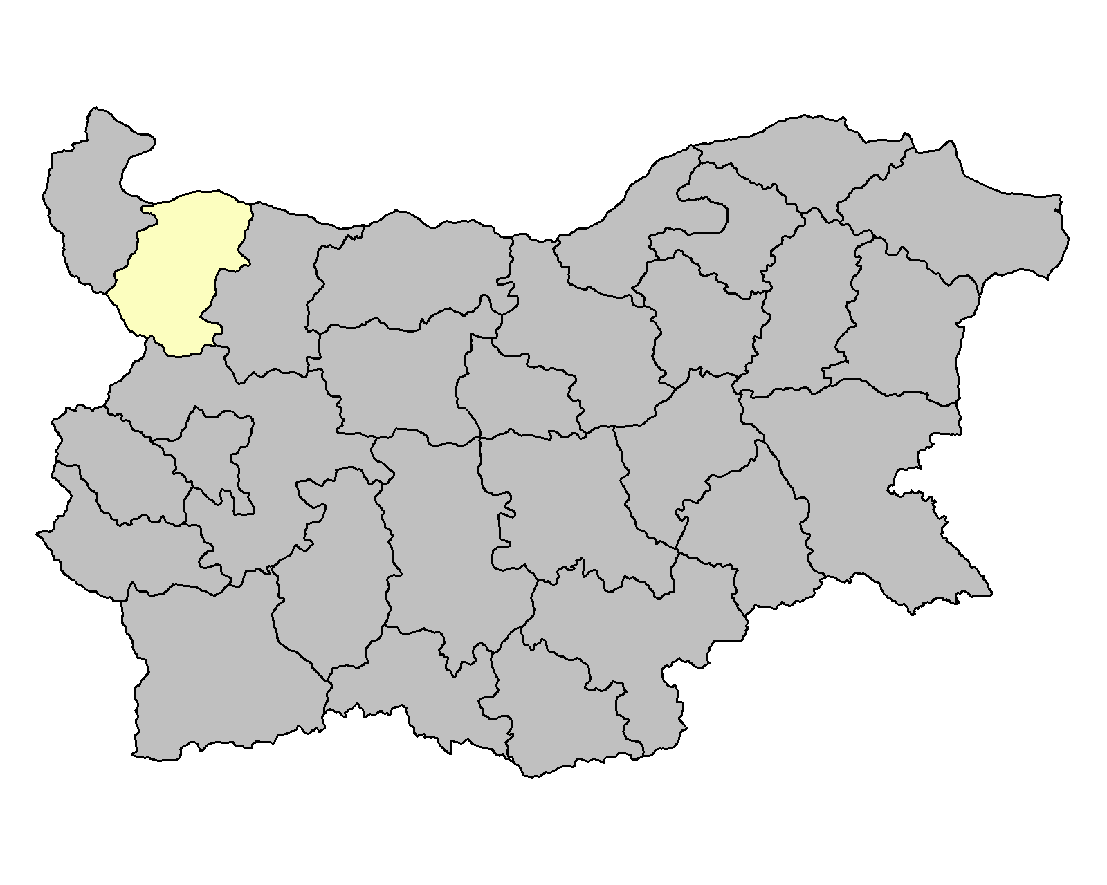 Област Монтана на картата на България